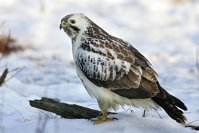 Buteo buteo